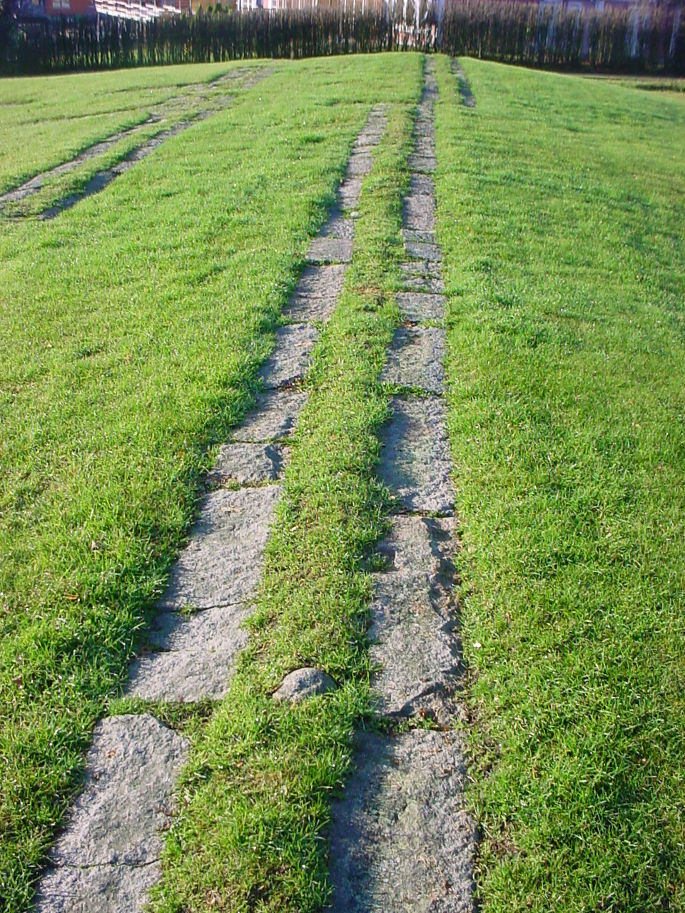 Enköping, Klosterparken, Spår efter det medeltida franciskanerklostret.